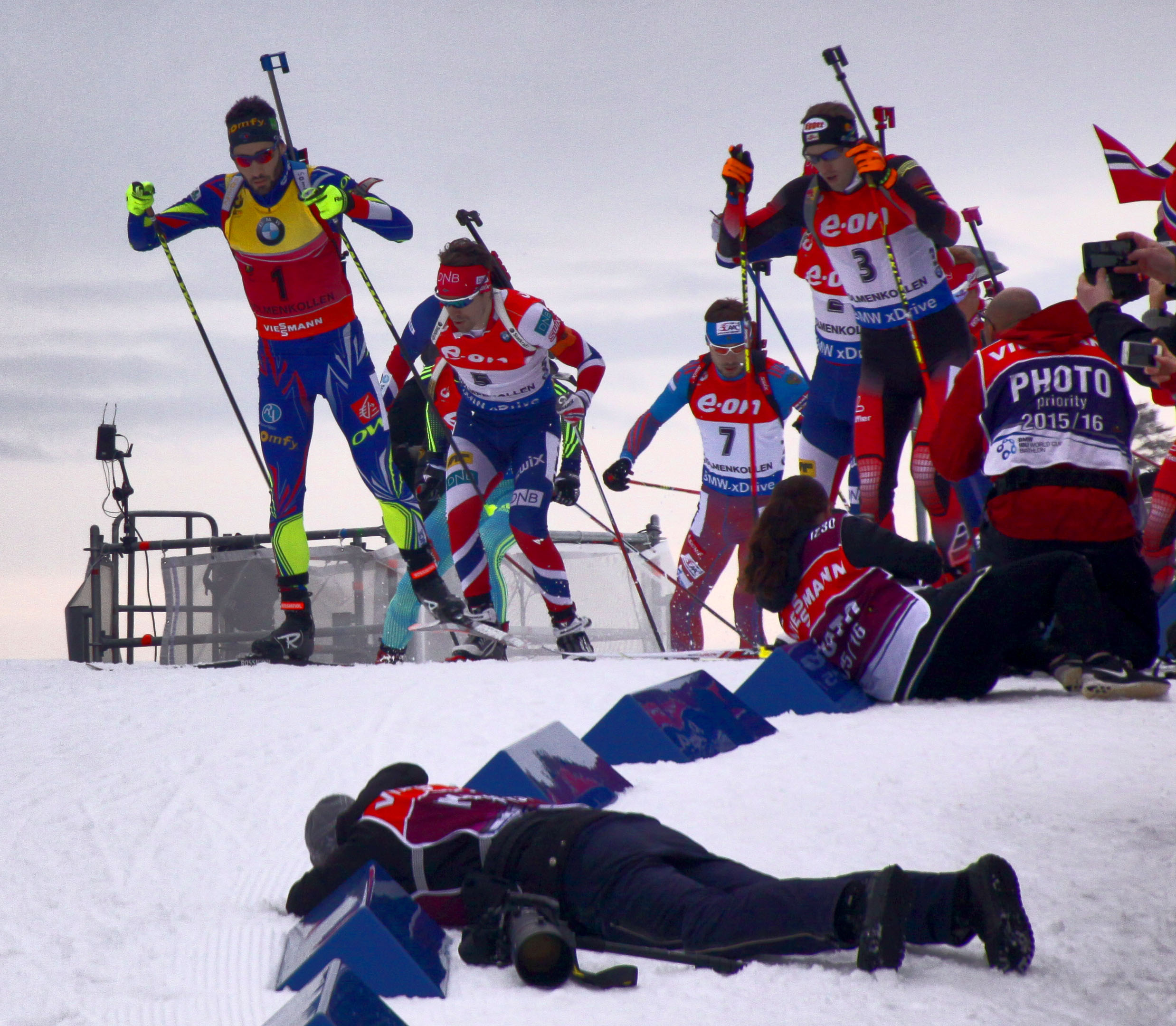 Oslo. Aux championnats du monde de biathlon.